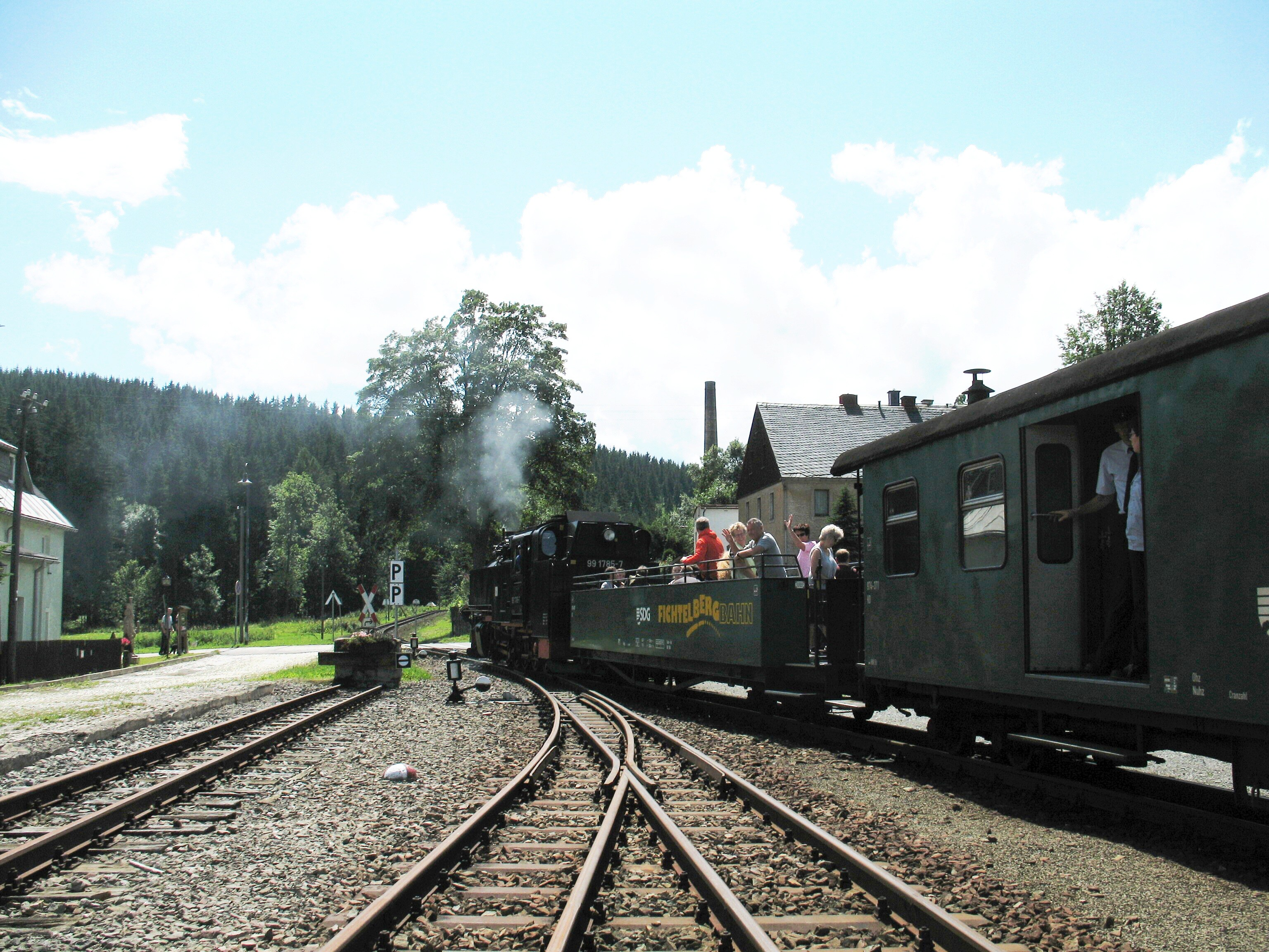 Vlak s turisty odjíždí z Hammerunterterwiesenthalu do Oberwiesenthalu